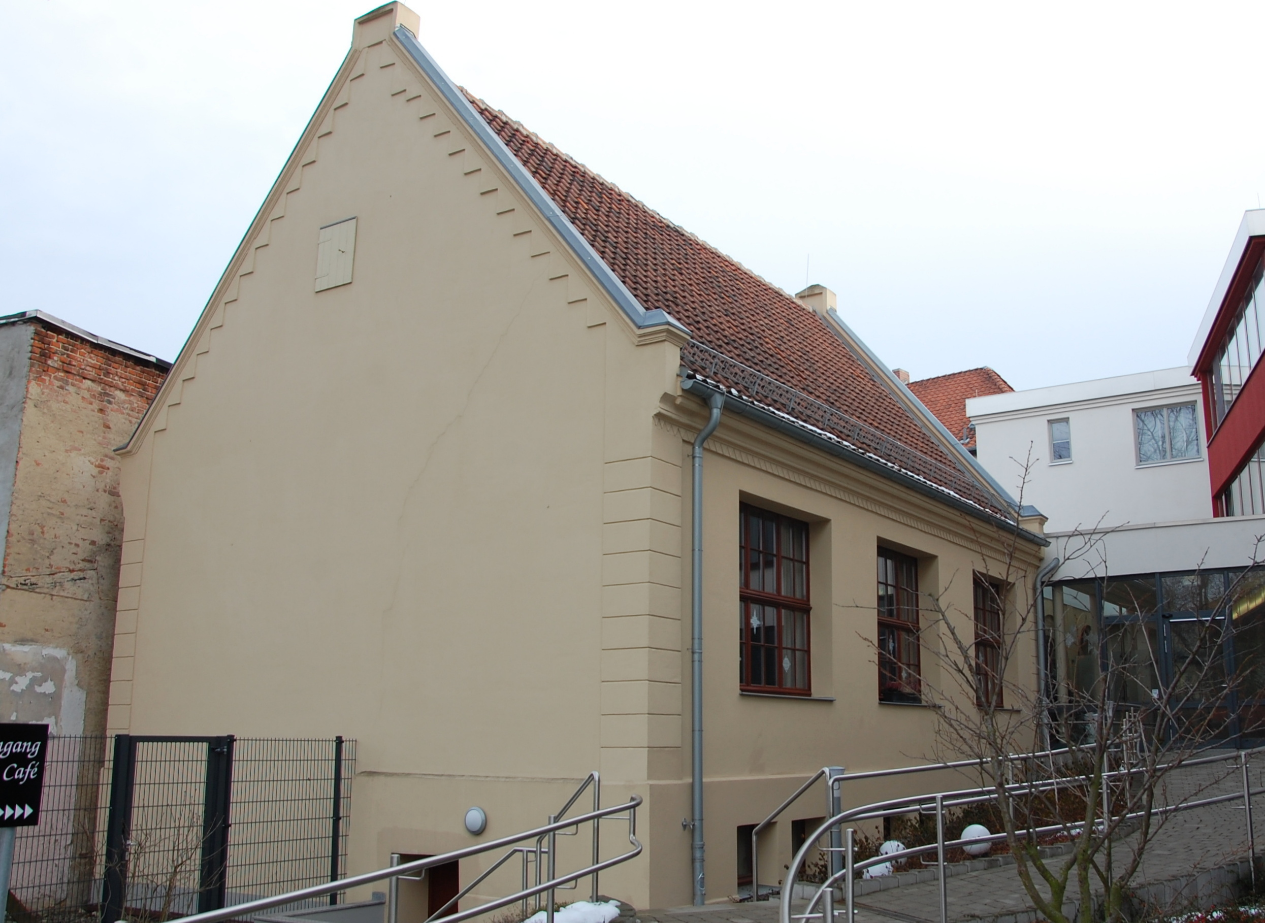 Haus Heiliggeiststraße 10 in Quedlinburg